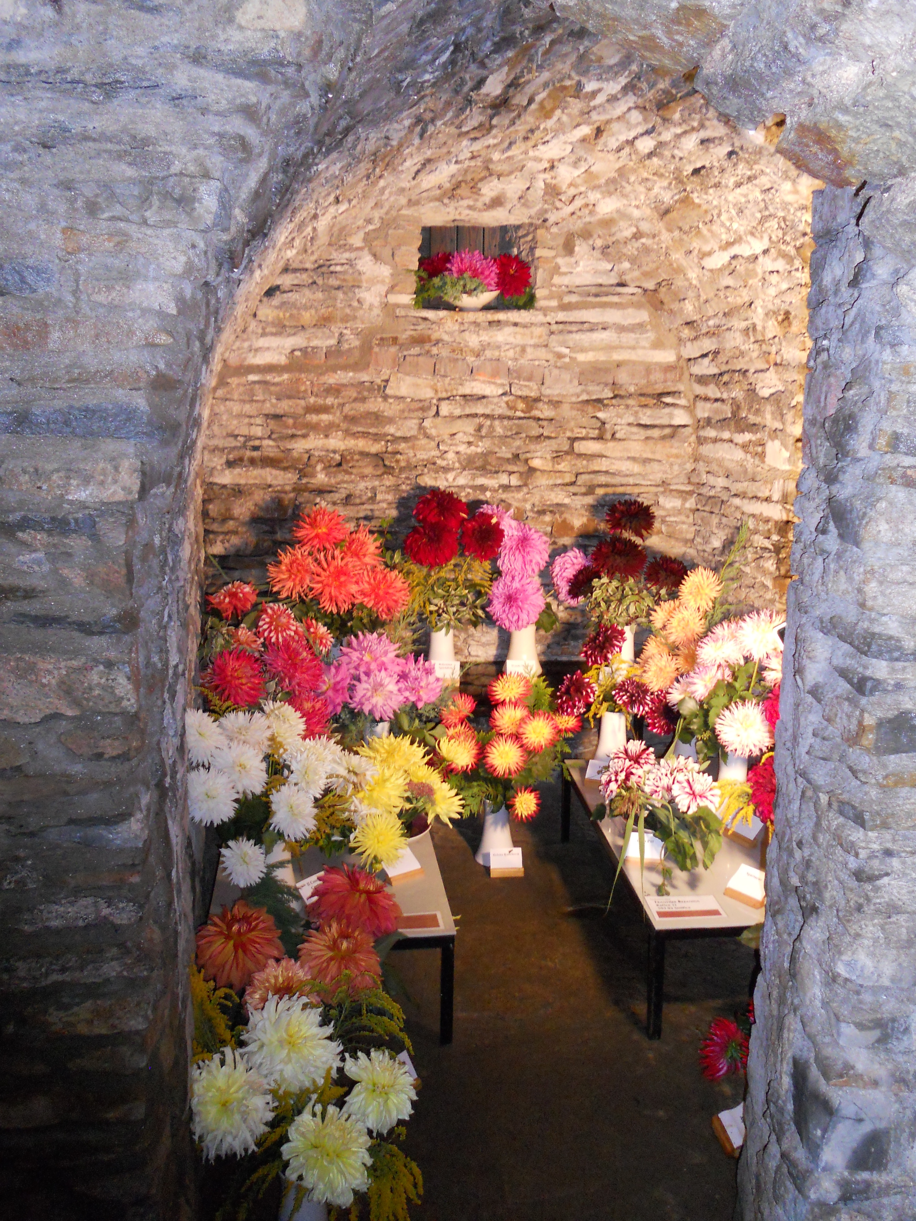 Výstava jiřin 2010 - vystavované řezané jiřinky v prostorách Maloskalické tvrze